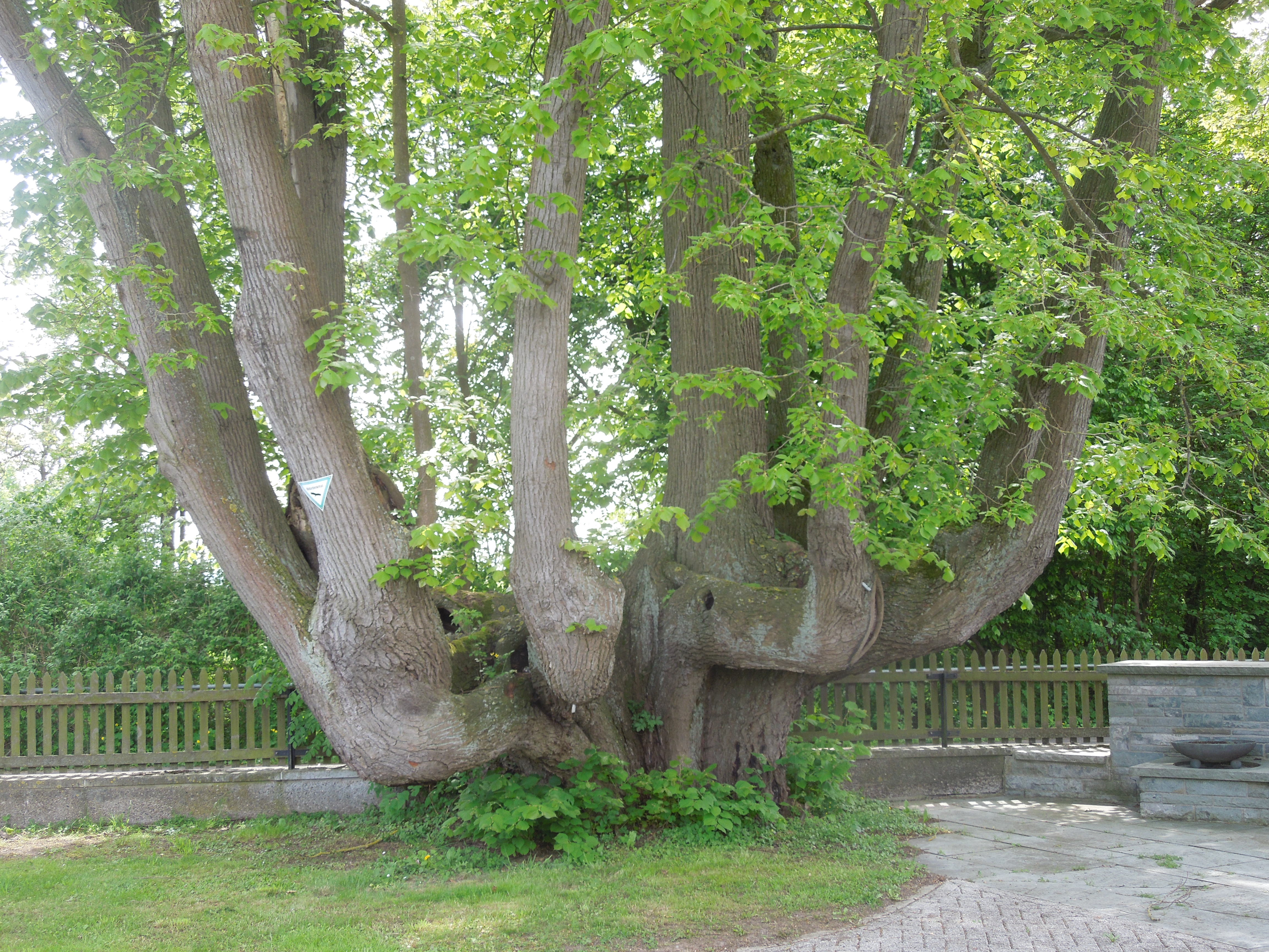 Der Fuß der Kandelaberlinde auf dem Friedhof im Gudensberger Stadtteil Dorla (Mai 2015, vor ihrer radikalen Stutzung im Juli 2015